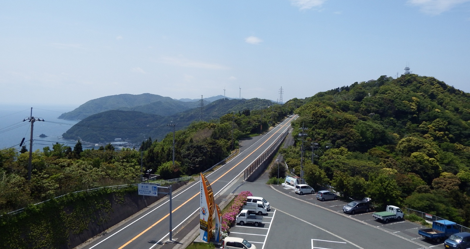 頂上ラインを走るメロディーライン